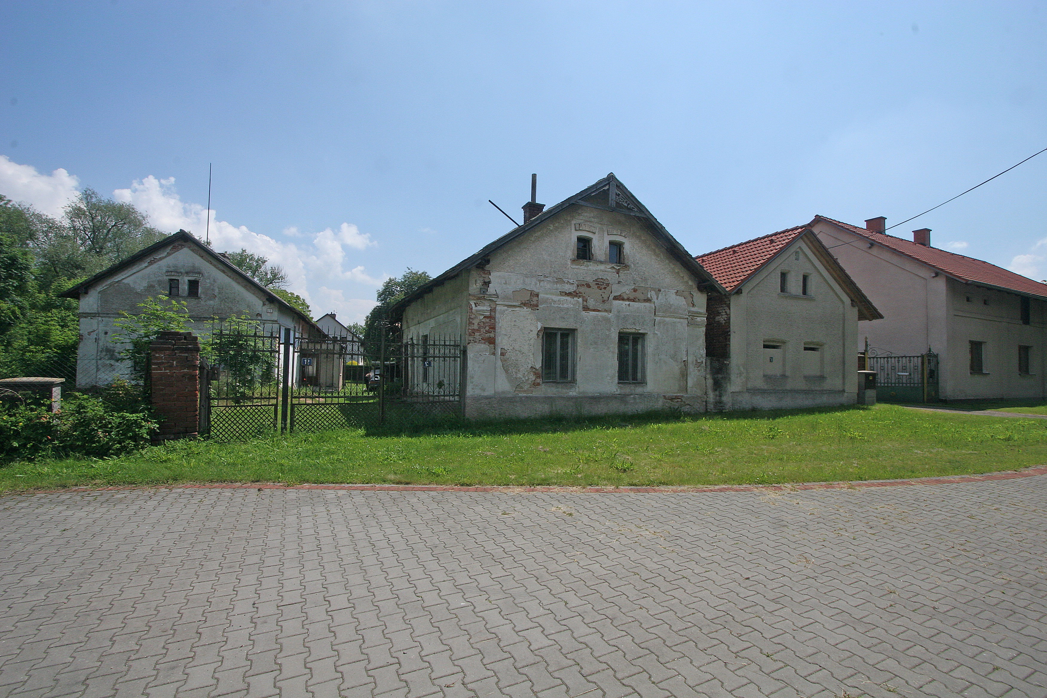 Březhrad Grégrovo náměstí 91